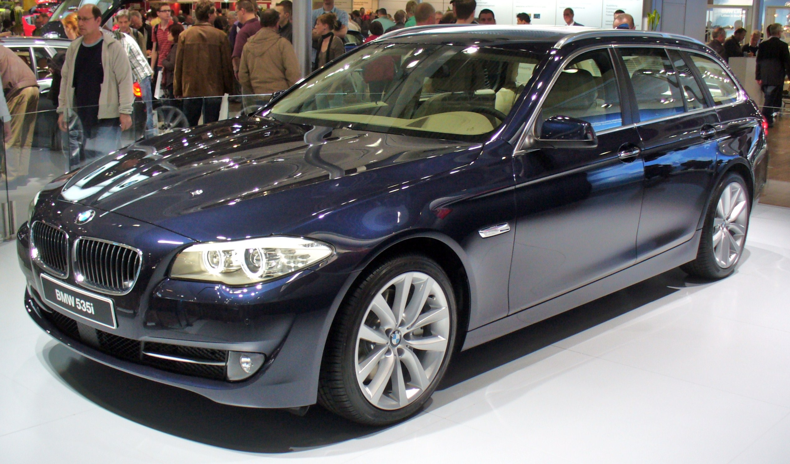 BMW 535i Touring